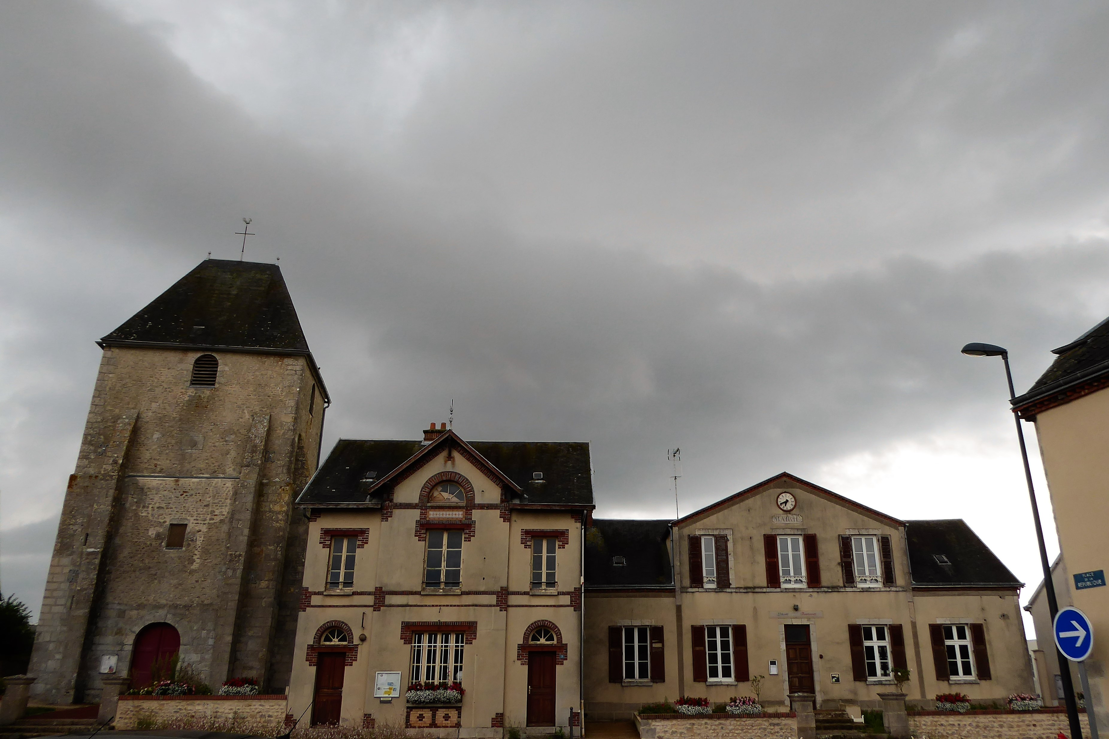 Place de la République : église Saint-Laurent, bibliothèque, mairie, Boisville-la-Saint-Père, Eure-et-Loir (France).